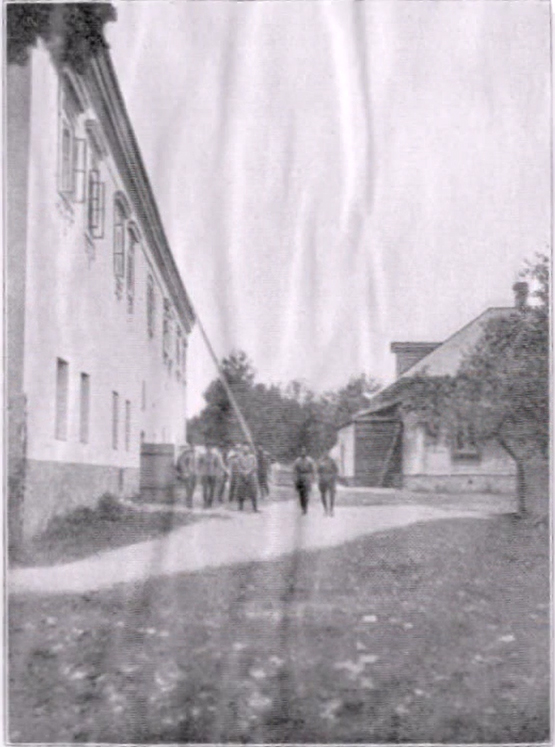 Беларуская (тарашкевіца): Быхаў (Bychaŭ), вуліца Касьцельная (vulica Kaścielnaja). Кляштар канонікаў лятэранскіх